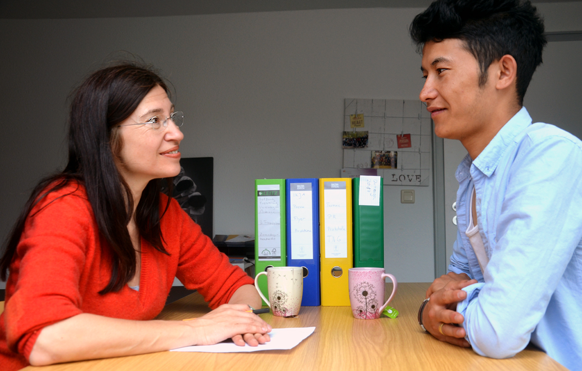 Nelly Hagen aus Deutschland und Mussa (18) aus Afghanistan beim Kennenlern-Gespräch im Büro der Paten-Initiative zur Integration von unbegleiteten Flüchtlingen des Vereins Internationaler Kultureller Jugend Austausch (IKJA) im Gemeindehaus der Evangelisch-reformierten Kirchengemeinde Hannovers unter der Adresse Brandstraße 25 in 30169 Hannover ...